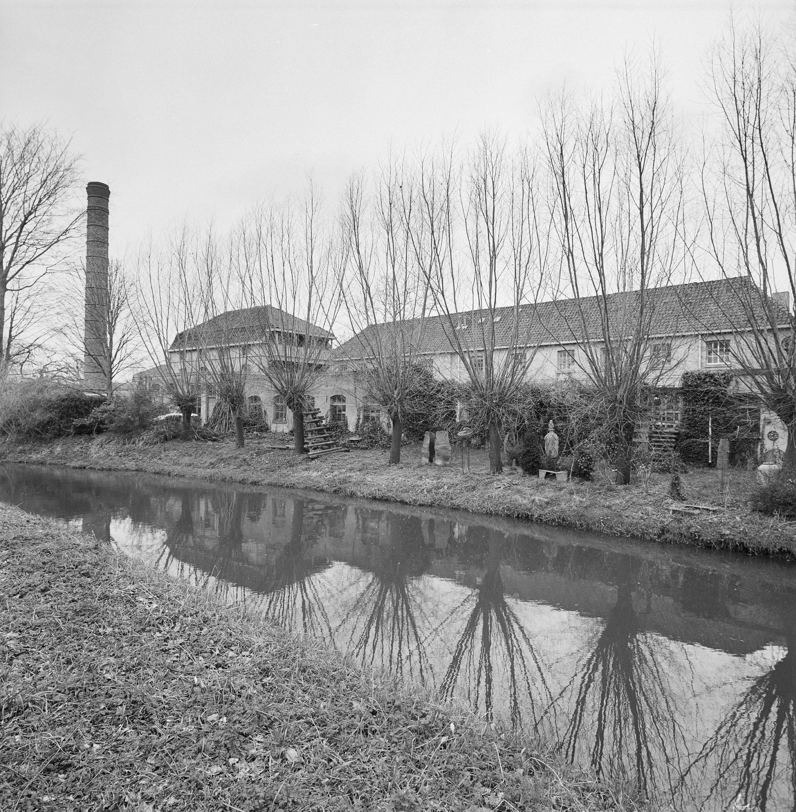 Voormalige Damastfabriek Van Oerle: Overzicht met schoorsteen en zicht op het Smalwater